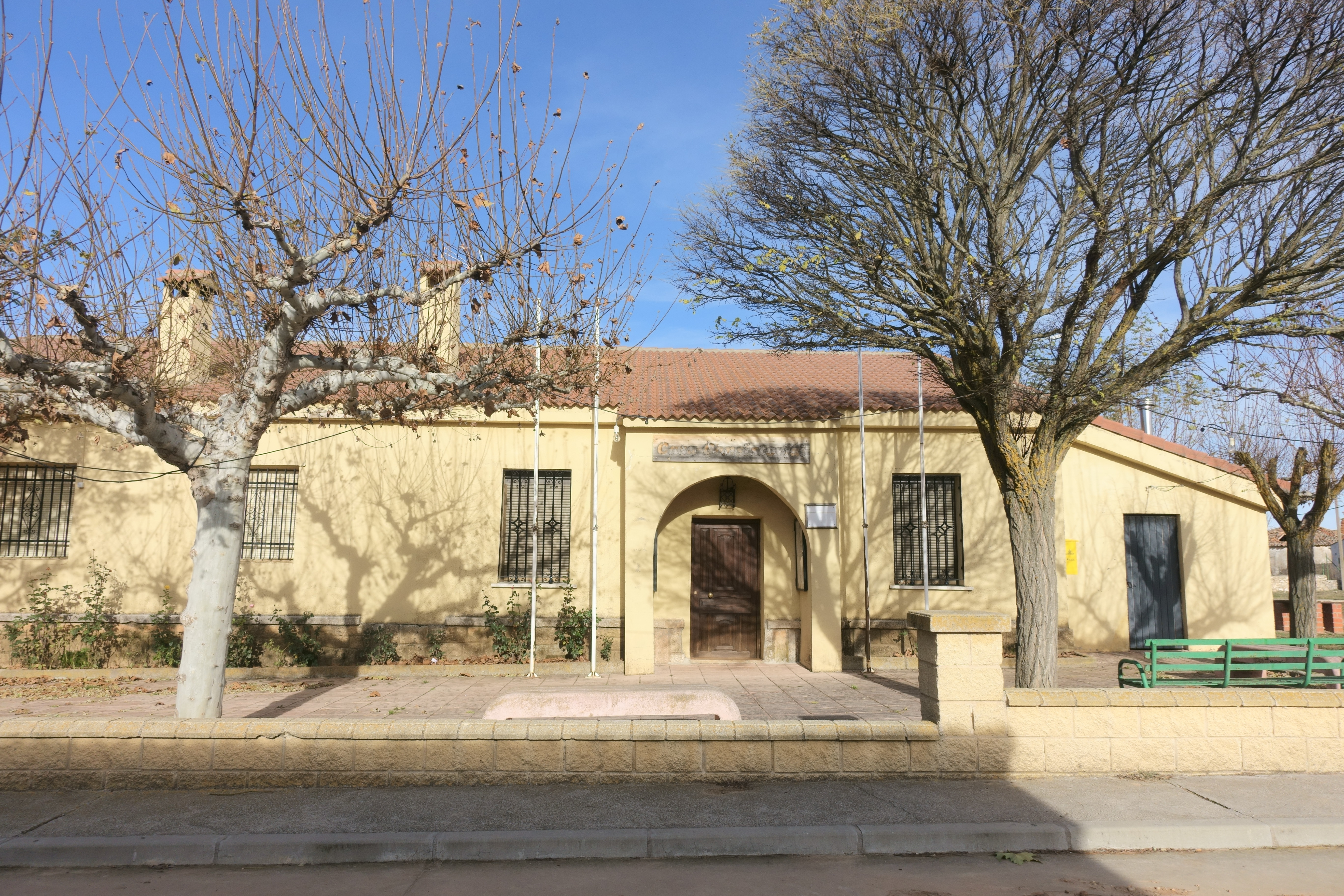 Casa consistorial de Riaguas de San Bartolomé (Segovia, España).